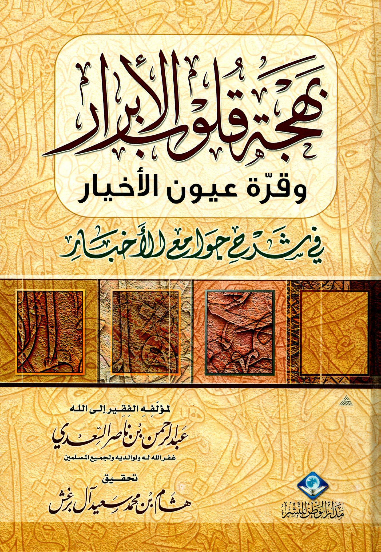 كتاب لعبد الرحمن السعدي، جمع فيه 99 حديثًا من جوامع الأحاديث في العلوم الدينية.